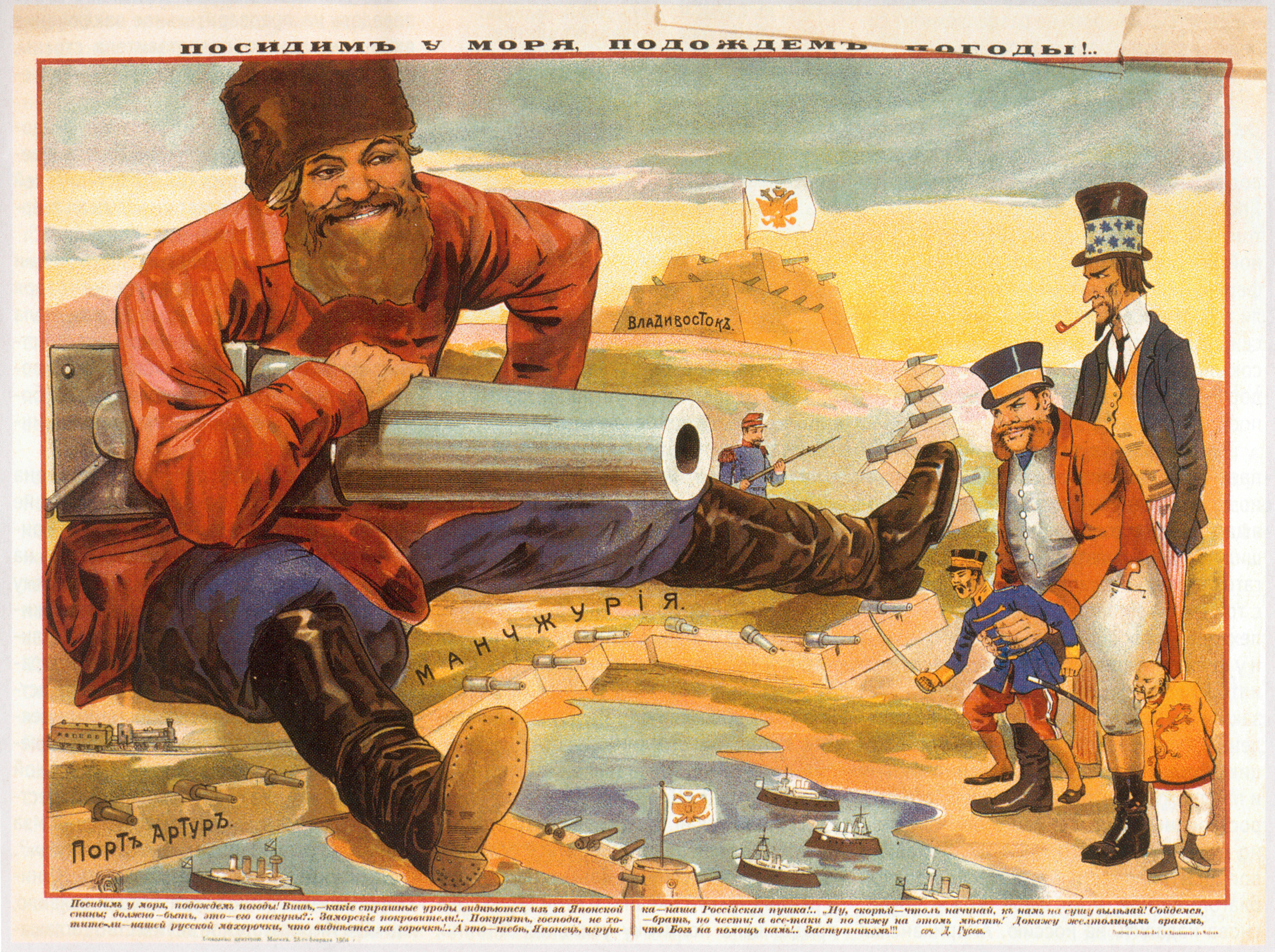 Русский плакат начала русско-японской войны Посидим у моря, подождем погоды Дозволено цензурою. Москва, 28-го февраля 1904 г. Джон Буль (Англия) и Дядя Сэм (США) толкают японского микадо на войну с Россией. Порт-Артур обороняет забайкальский казак, зажав под мышкой крепостное орудие. Ниже стихи: Посидим у моря, подождем погоды! Вишь, - какие страшные уроды виднеются из-за японской спины; Должно-быть, это - его опекуны?.. Заморские покровители!.. Покурить, господа, не хотите-ли - нашей русской махорочки, что виднеется на горочке!.. А это - тебе, Японец, игрушка - наша Российская пушка!.. Ну, скорей - чтоль начинай, к нам на сушу вылезай! Сойдемся, - брат, по чести; а все-таки я посижу на этом месте! Докажу желтолицым врагам, что Бог на помощь нам!.. Заступником!!!